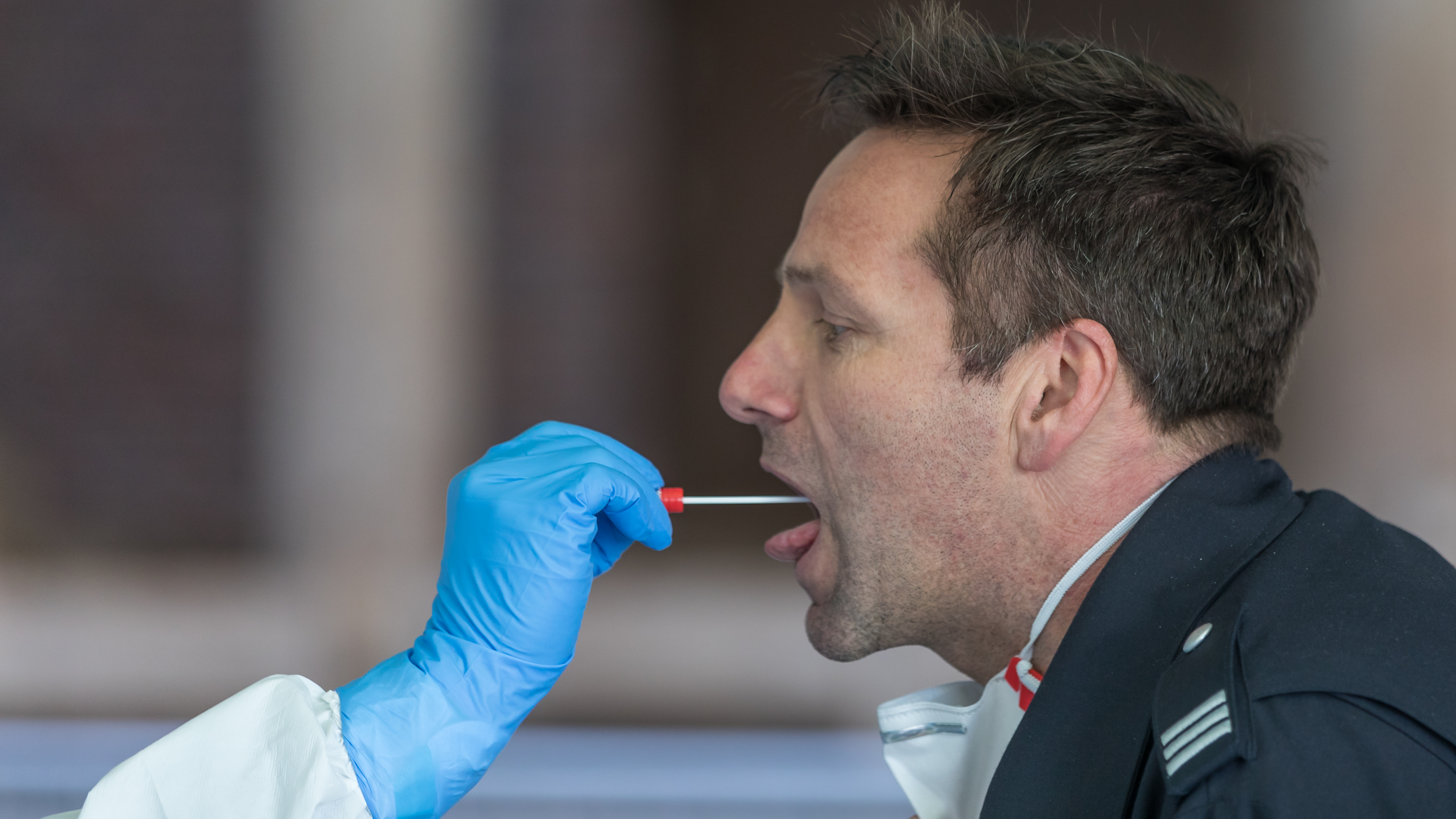 Infektionsschutzzentrum im Kulturquartier/Rautenstrauch-Joest-Museum, Köln. Getestet werden dort ausschließlich Personen, die in sogenannten kritischen Infrastrukturen tätig sind.Mitarbeiter des Infektionsschutzzentrums demonstrieren an einem Feuerwehrmann, der sich als Testperson zur Verfügung stellt, wie ein Abstrich durchgeführt wird.